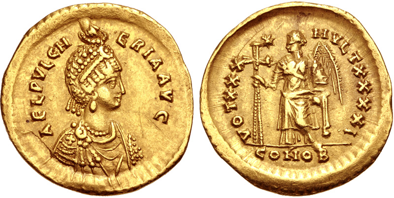 Soldo de Élia Pulquéria de ca. 425-425